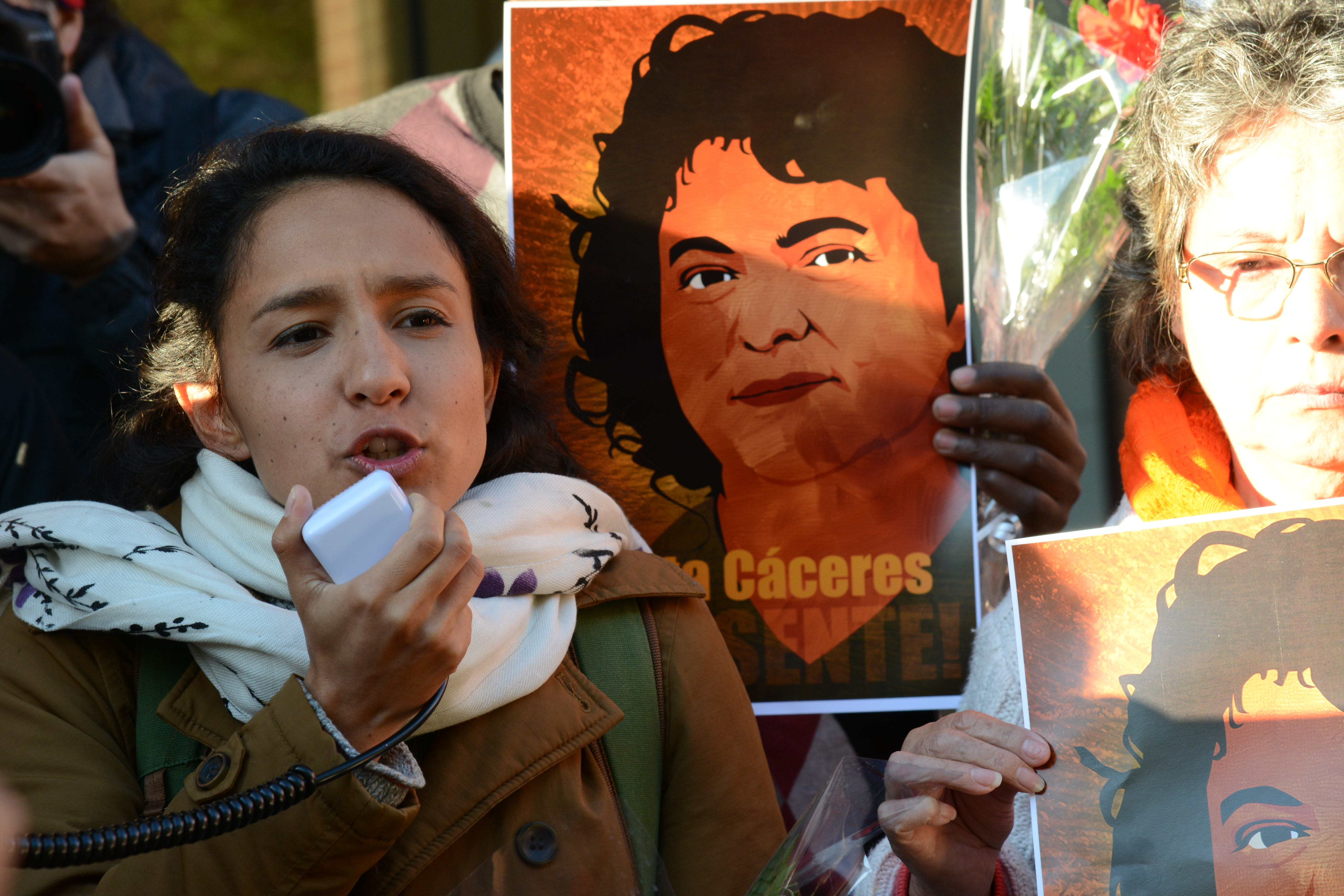 Manifestación Berta Cáceres en las puertas de la OEA en Washington DC el 5 de abril de 2016. Hablando en el megáfono: Berta Zúñiga Cáceres (hija de Berta Cáceres) Tras la audiencia sobre la situación de los derechos humanos en el Bajo Aguán que tuvo lugar en la CIDH el 5 de abril de 2016, se realizó una vigilia en las puertas de la OEA por Berta Cáceres, asesinada el 3 de marzo de 2016 en Honduras. Comisionados y Comisionadas de la CIDH salieron a la puerta de la OEA a escuchar las palabras de su hija, Berta Zúñiga Cáceres.